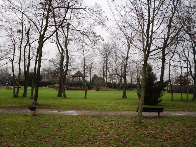 Le parc Saint-Michel de Morangis (91)